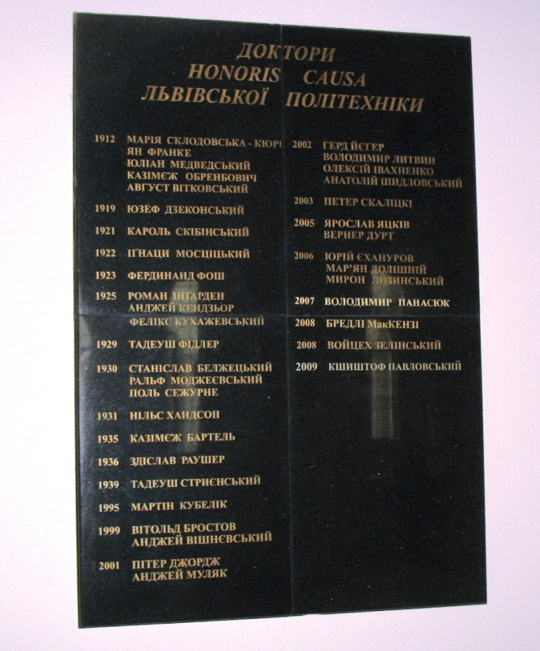 доктори Honoris causa Львівської політехніки